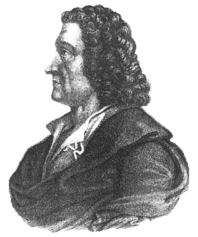 Иоганн Фридрих Бёттгер